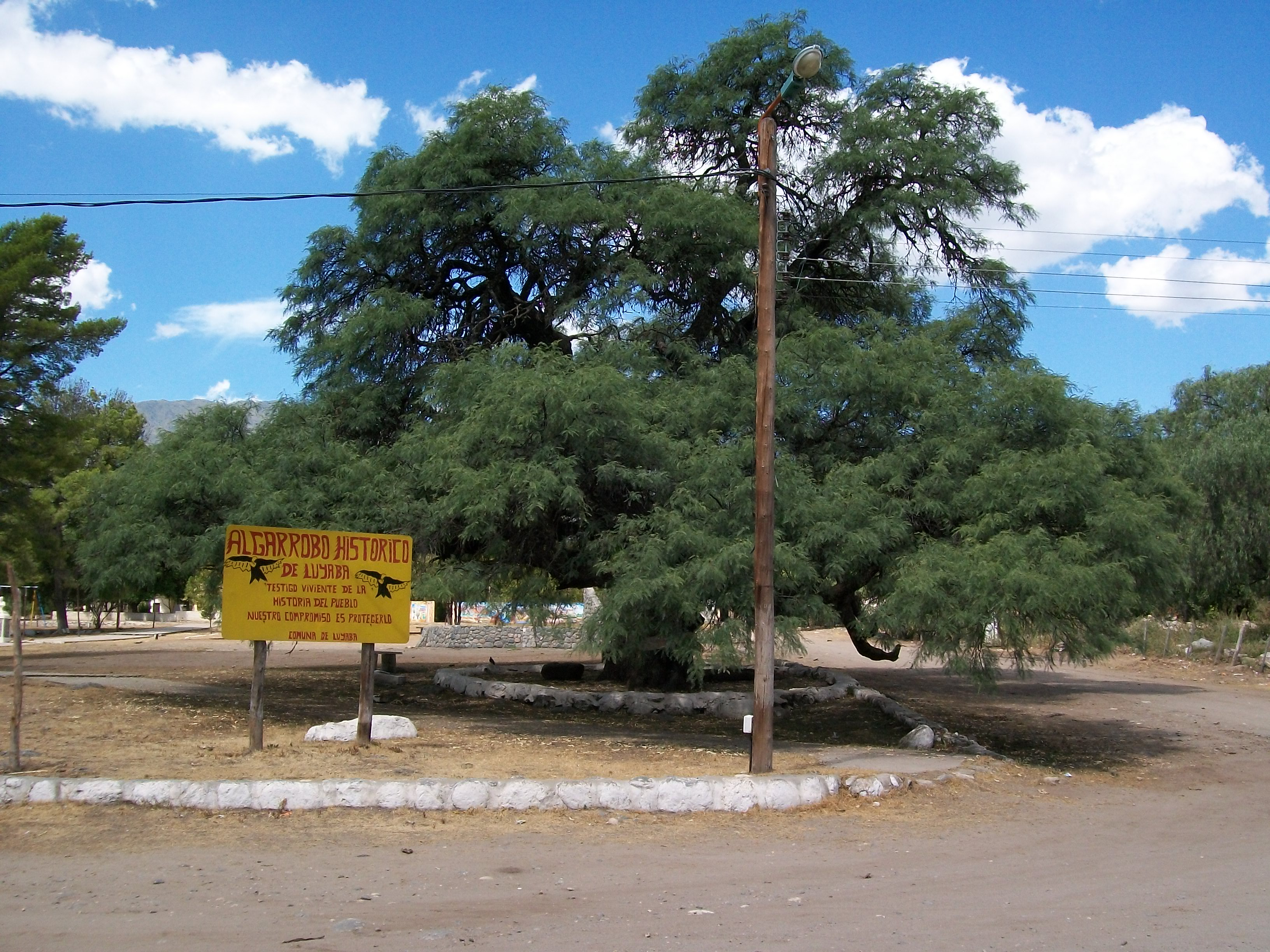 Algarrobo histórico, localidad de Luyaba, Traslasierra, Córdoba, Argentina